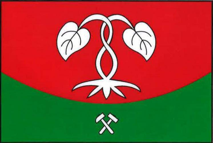 vlajka, Jemníky, okres Kladno